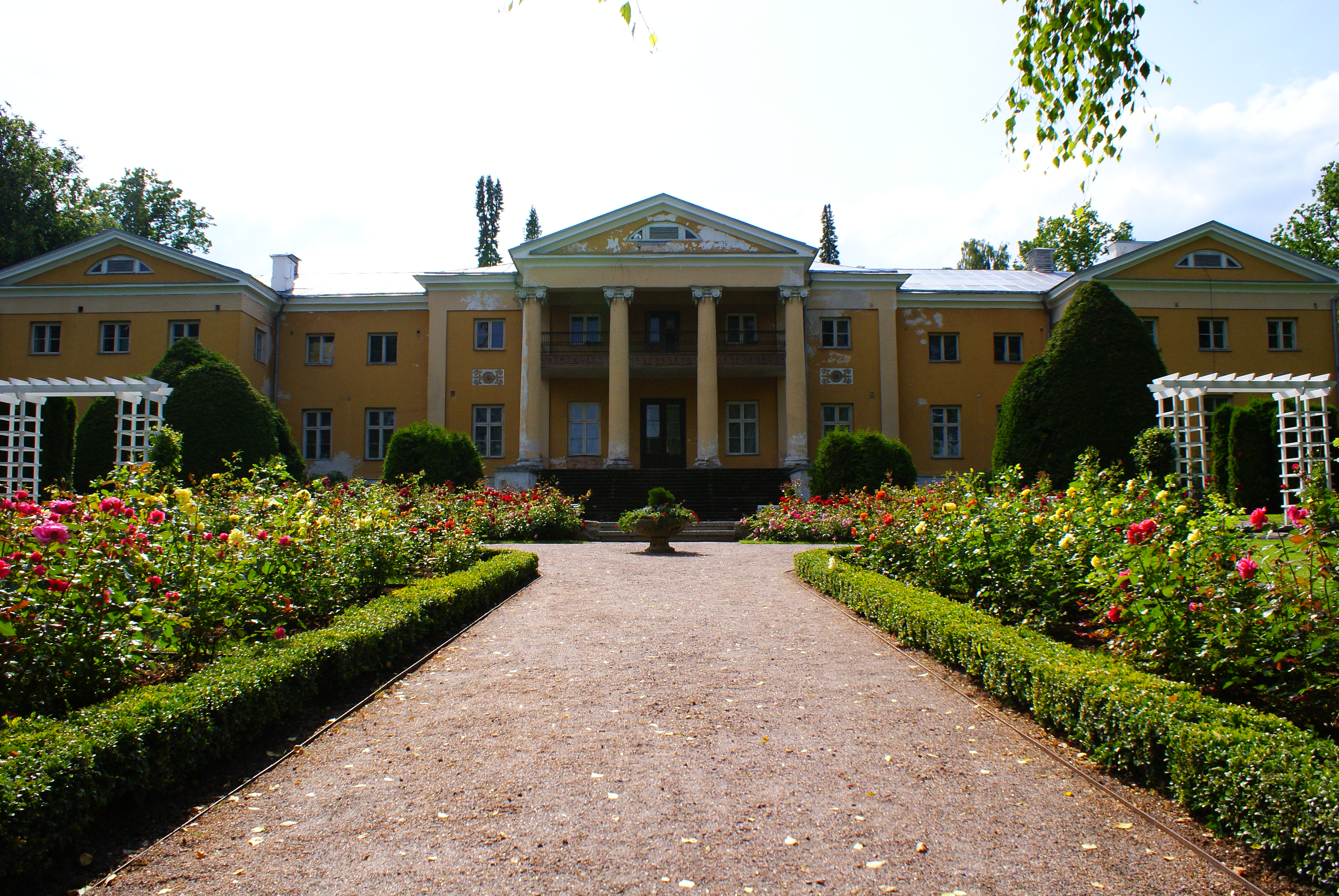 Räpina mõisa park